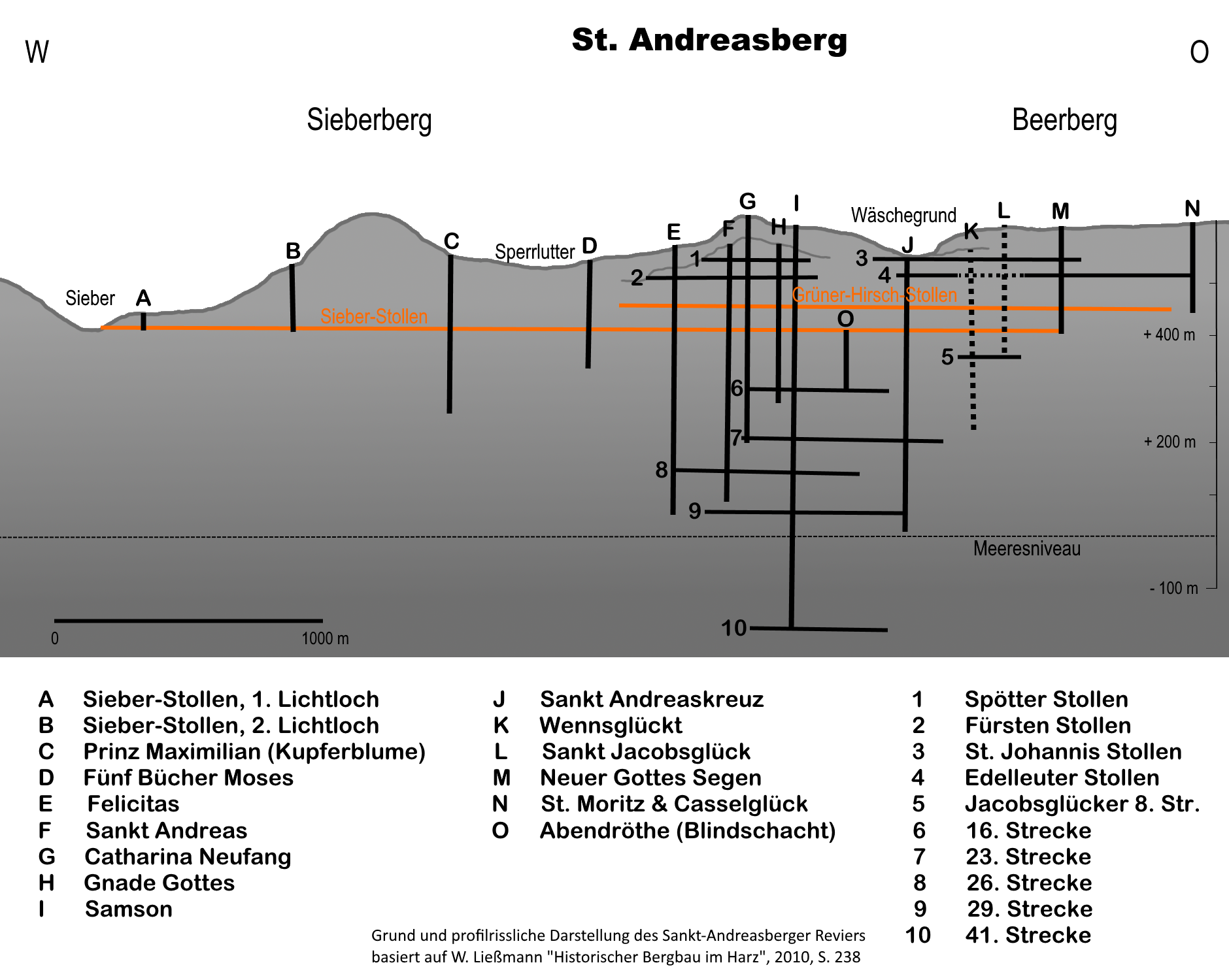 basiert auf „Grundriss der tiefen Oberharzer Wasserlösungsstollen“, in: W. Ließmann: Historischer Bergbau im Harz, 2010, S. 238